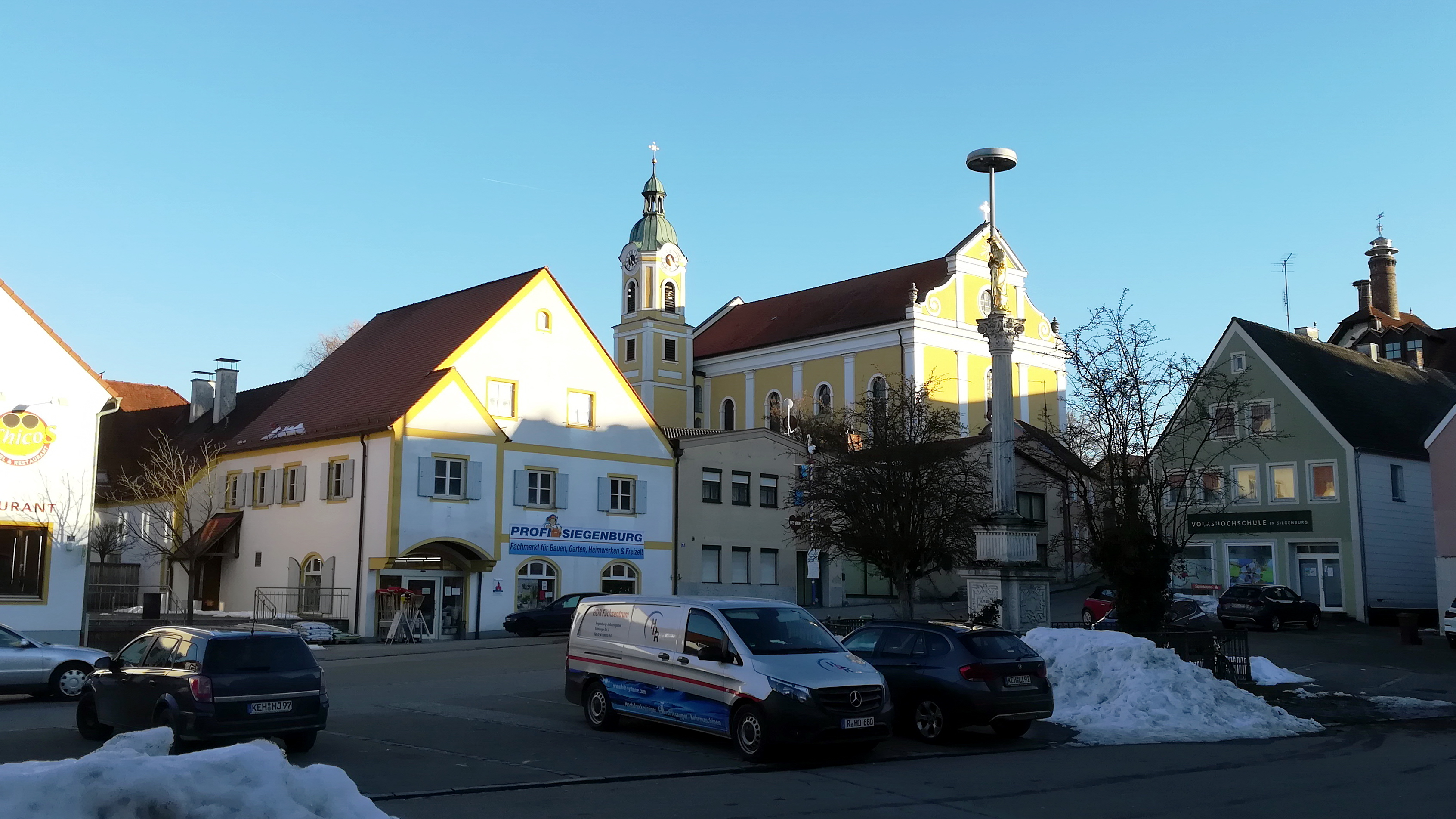 Die römisch-katholische Pfarrkirche St. Nikolaus in Siegenburg im niederbayerischen Landkreis Kelheim wurde in den Jahren 1892 und 1893 im Stile des Neobarock errichtet und dem Heiligen Nikolaus geweiht.